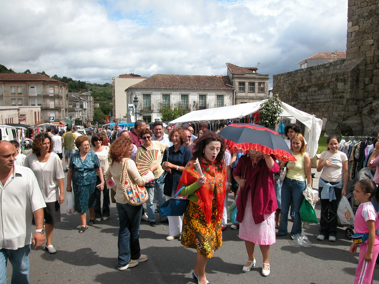 Ribadavia, Ourense - Galicia - Spain. MIT ano 2003. "As Marias" facendo teatro de rúa no día de feira.